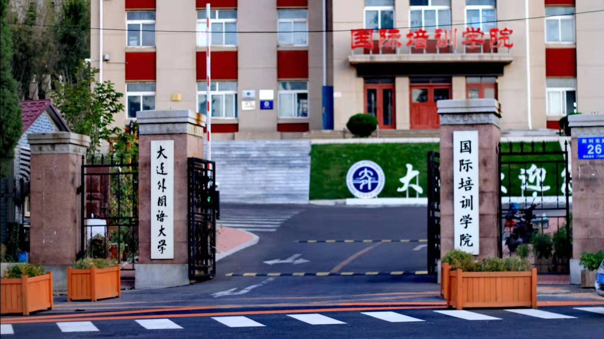 中文（中国大陆）: 大外老校区